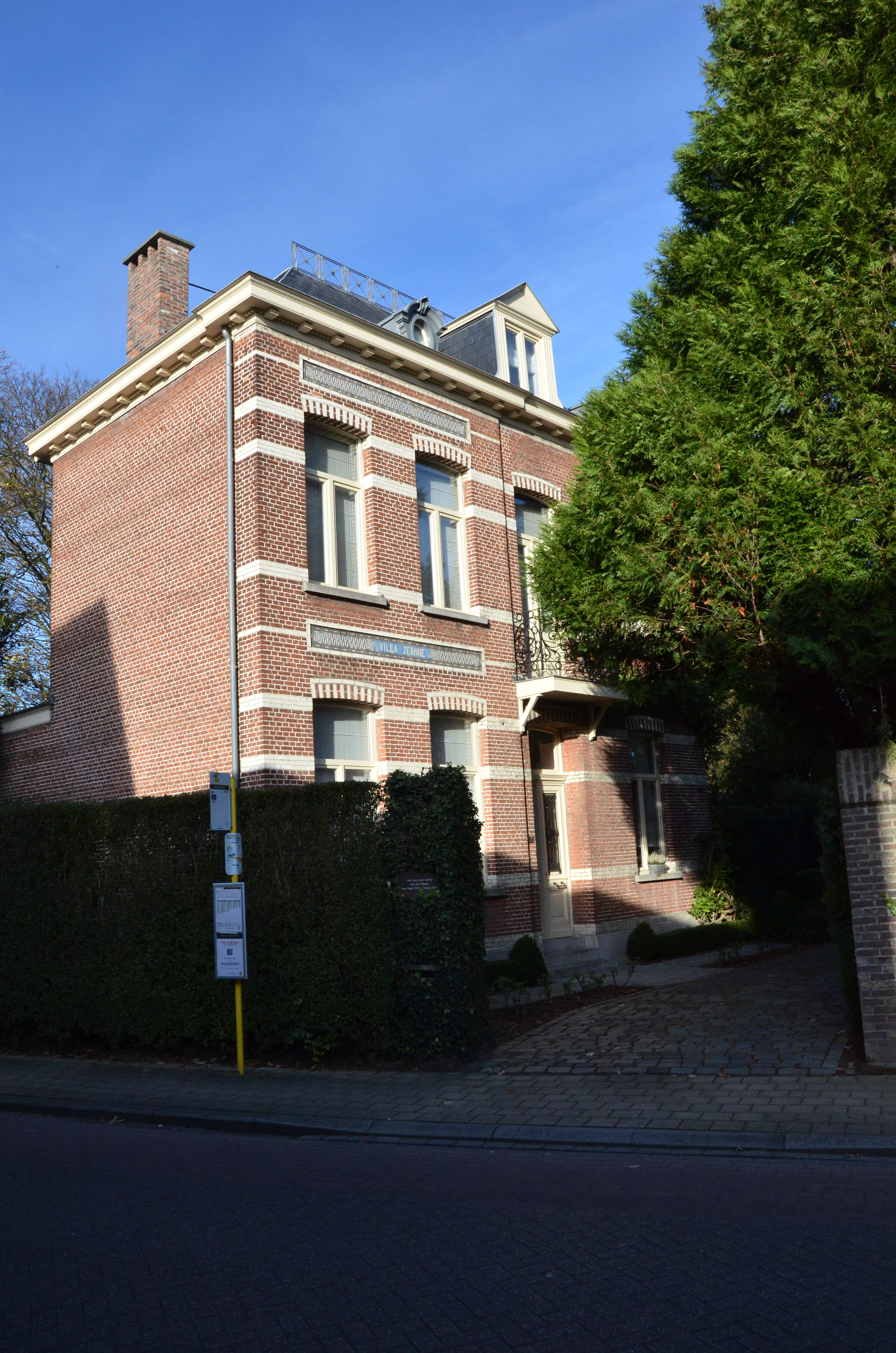 Villa Jeanne, burgerhuis ca. 1900